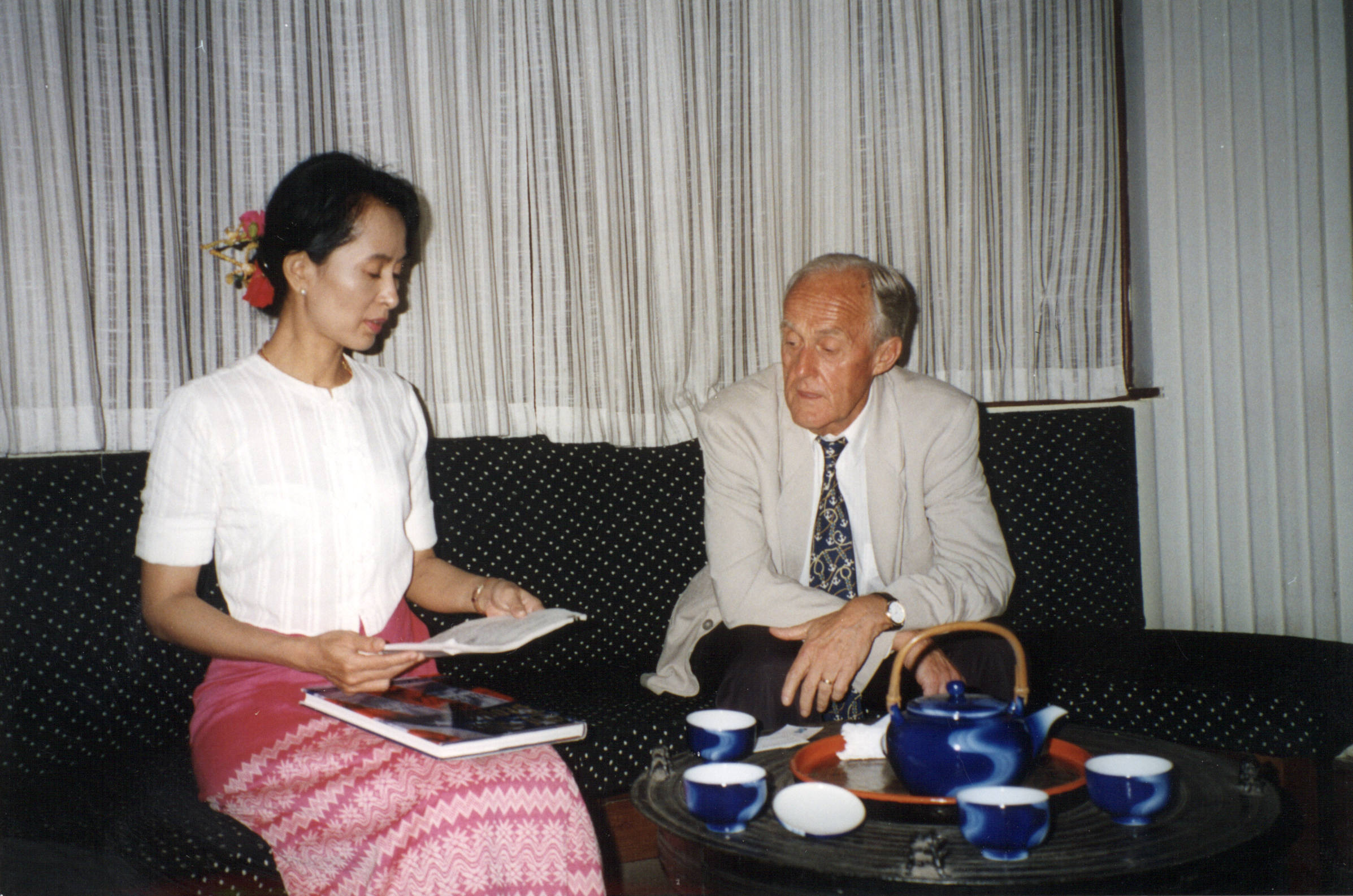 Edgardo Boeninger en Myanmar junto a Aung San Suu Kyi.